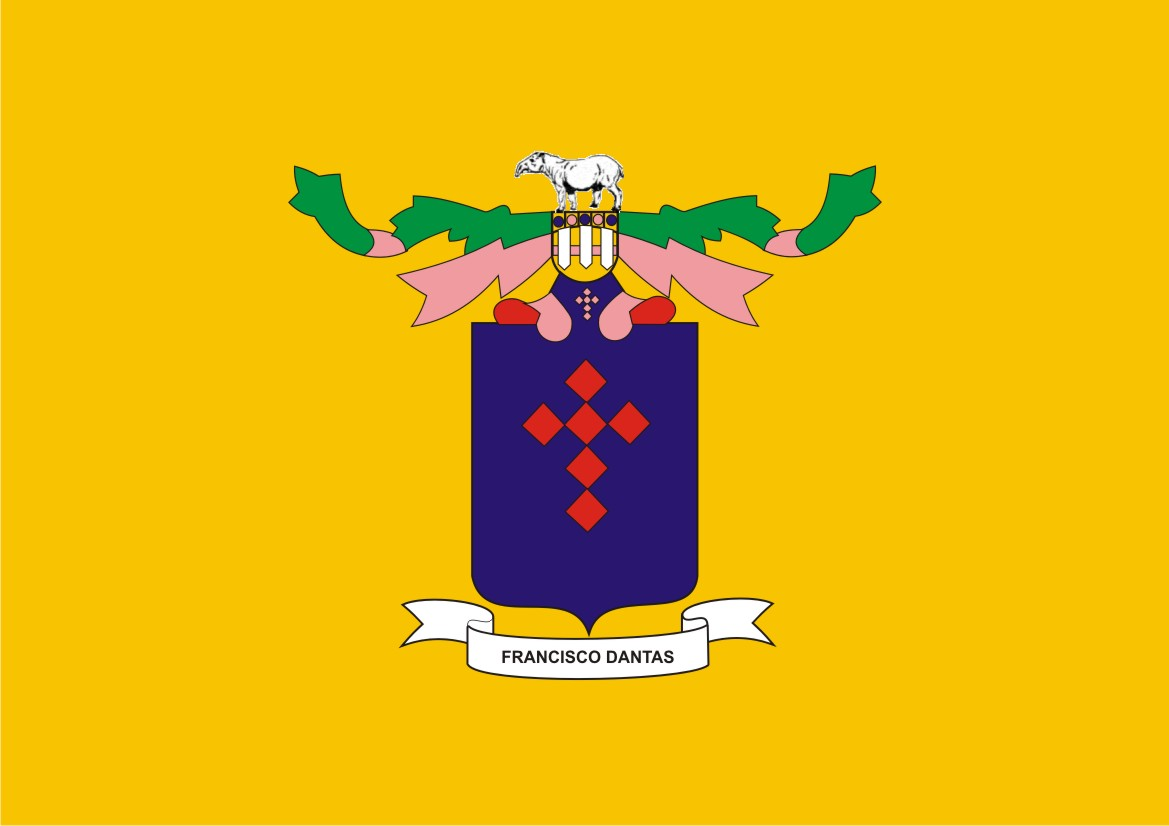 Bandeira de Francisco Dantas, estado do Rio Grande do Norte, Brasil.